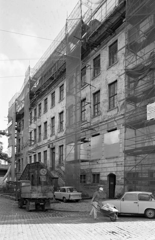 11.-18.8.1991 Bundesland Sachsen-Anhalt Halle Frankesche Stiftungen in der Rekonstruktion